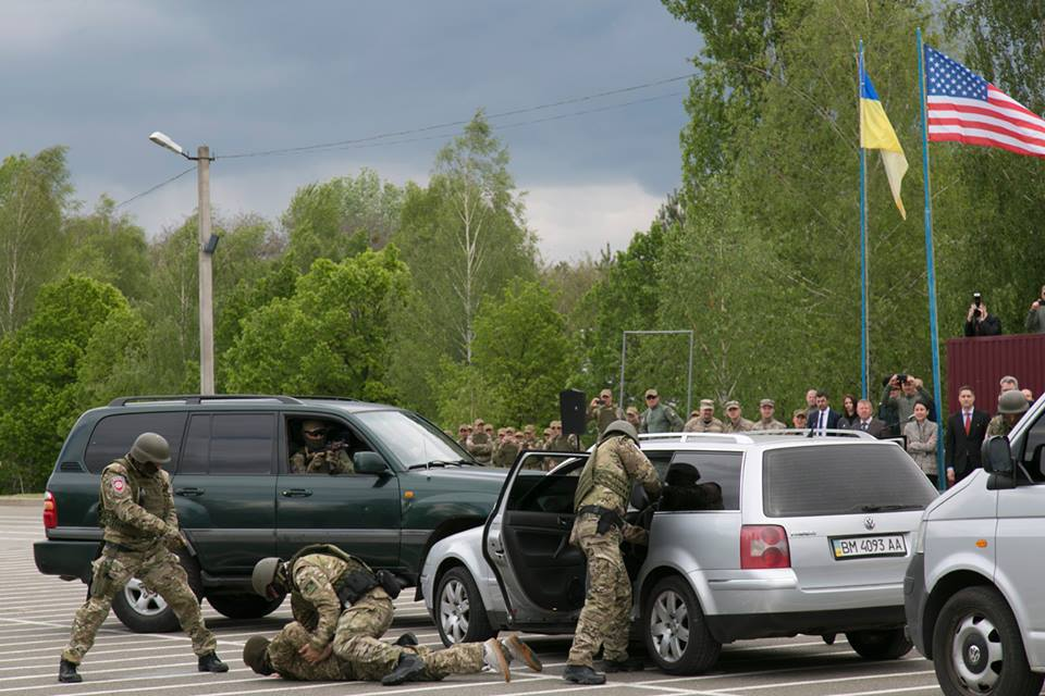 КОРД (укр. Корпус Оперативно-Раптової Дії, рус. Корпус оперативного внезапного действия) — специальное подразделение быстрого реагирования Национальной полиции Украины.